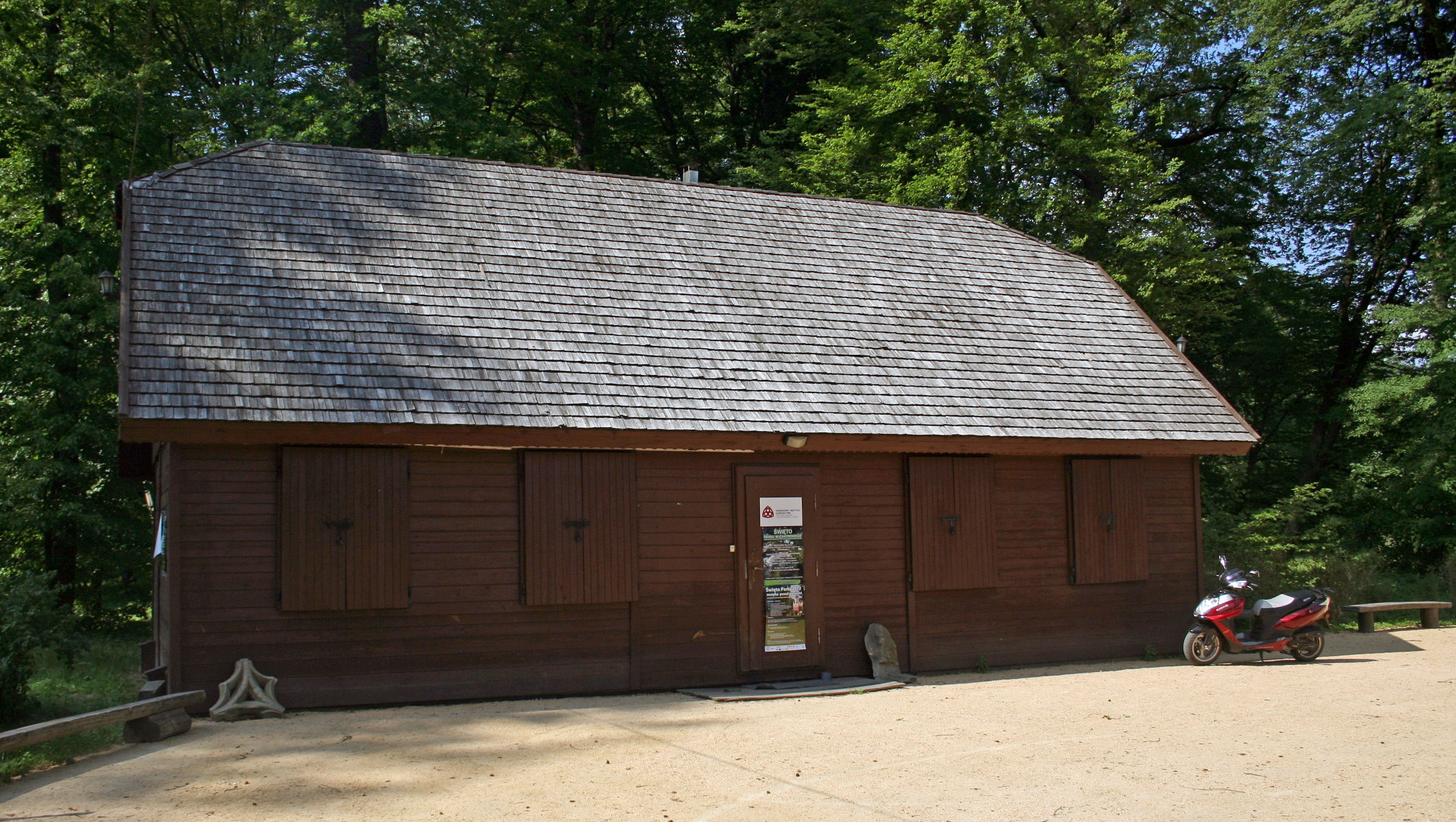 Park Mużakowski, pracownia terenowa NID w Łęknicy